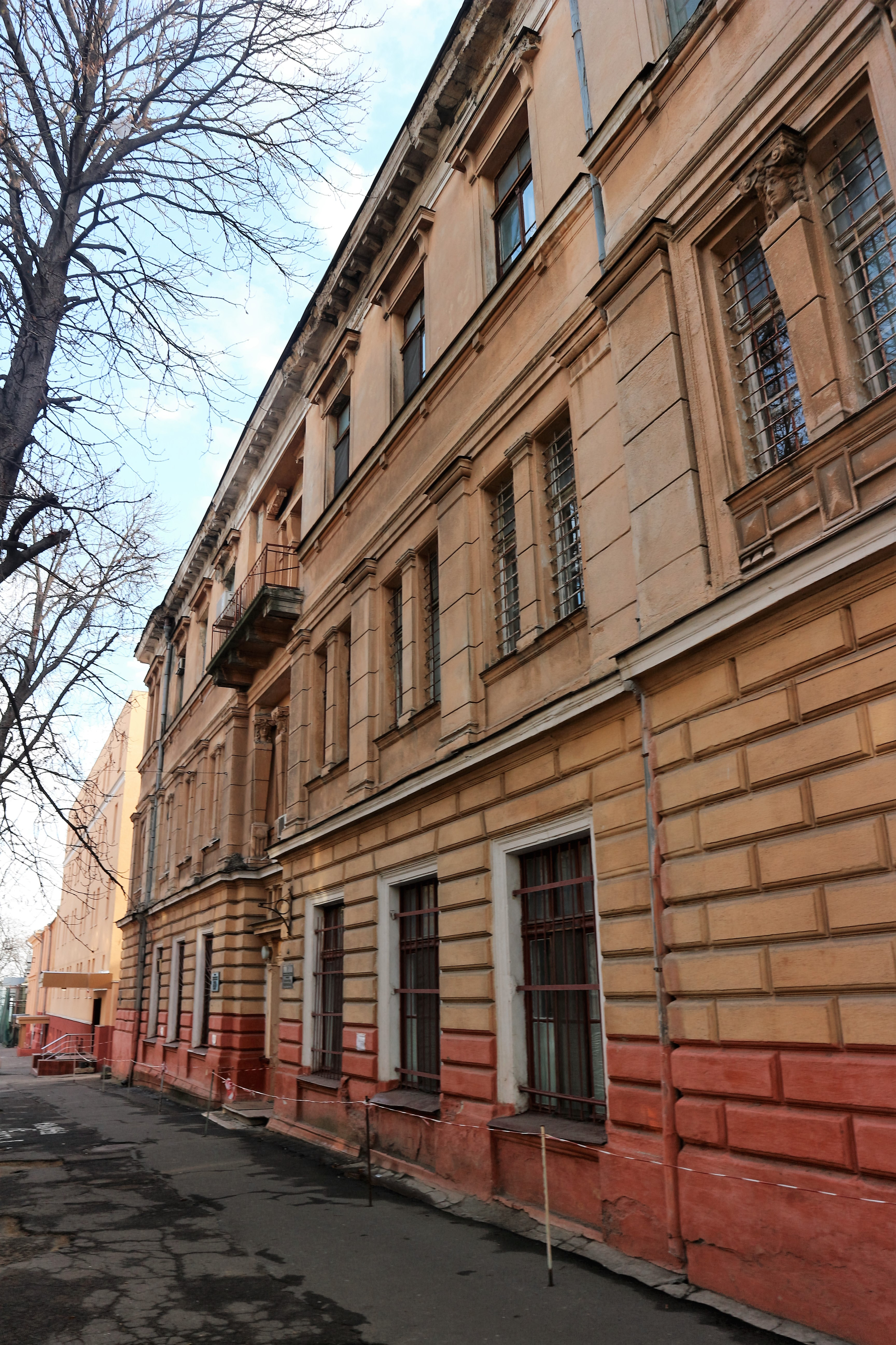 Вікі любить пам'ятки